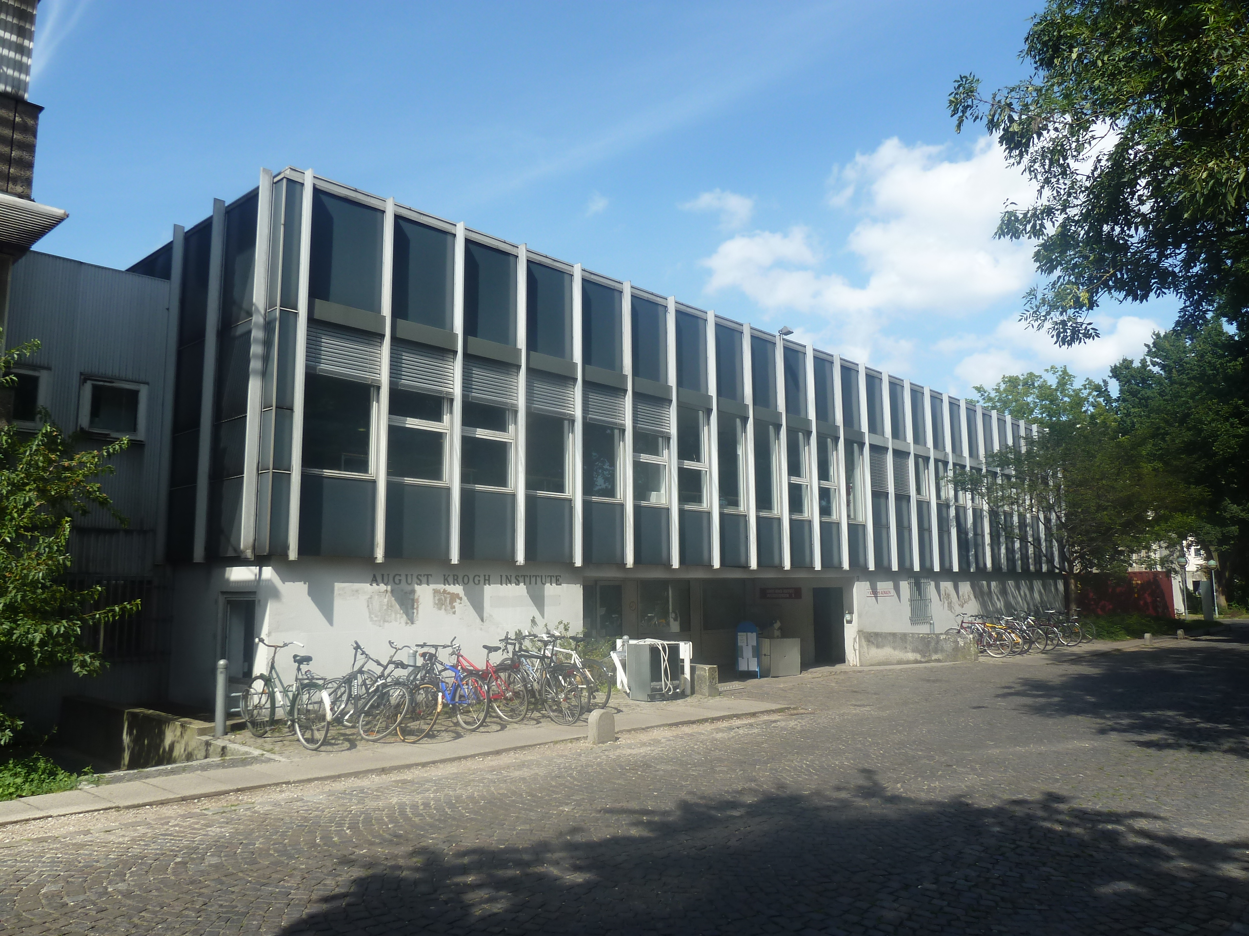 August Krogh Institute in Østerbro, Copenhagen.